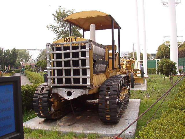 Tractor (1910), foto junio-2003